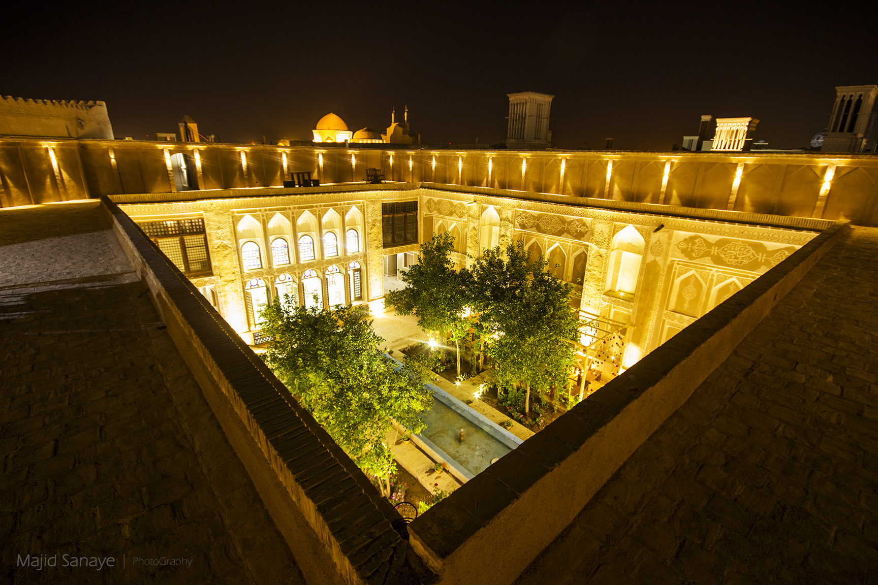 عکس مجید صنایع پرکار